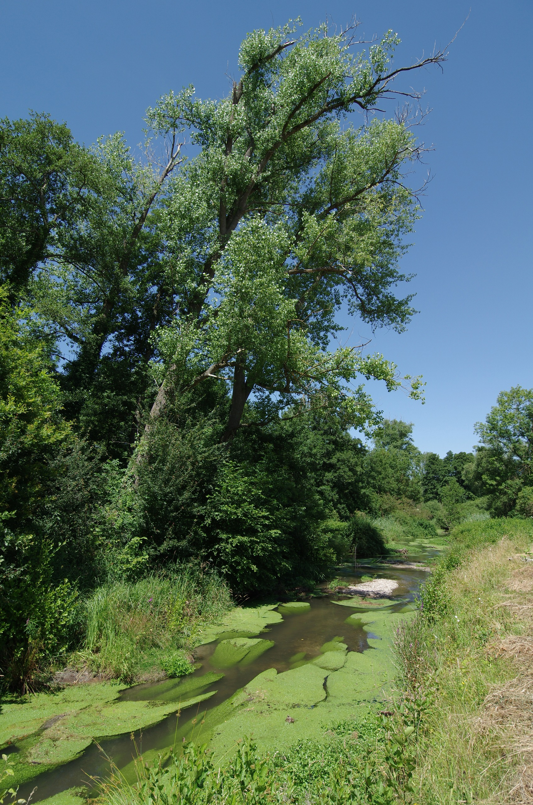 Der Riedkanal an dem zu Baden-Baden gehörenden Südrand des Naturschutzgebiets Rastatter Ried.